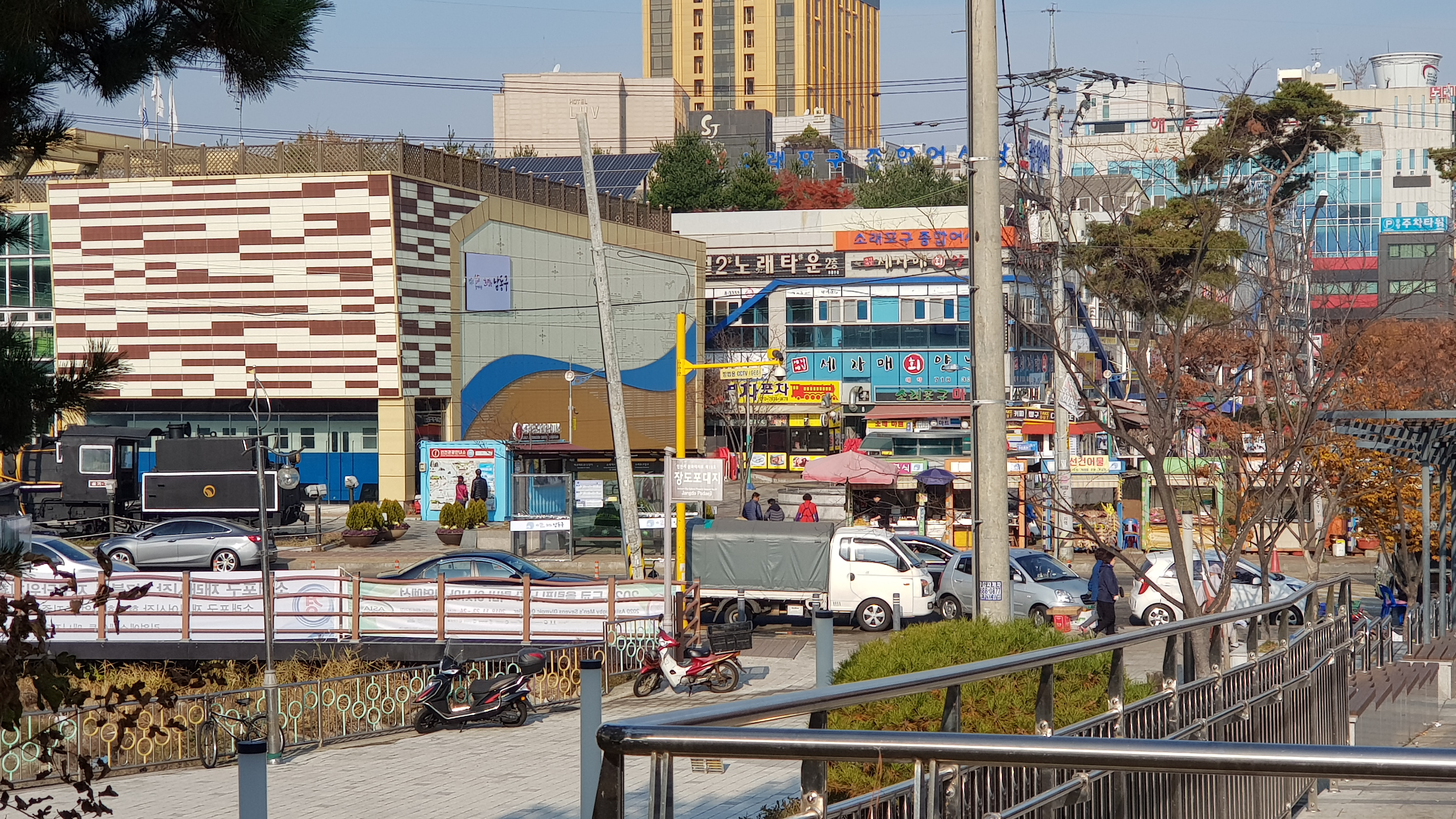 소래종합어시장